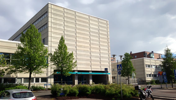 Radiotalo. Pasila, Helsinki. Uutiskatu 5. Arkkitehti: Kurt Simberg.